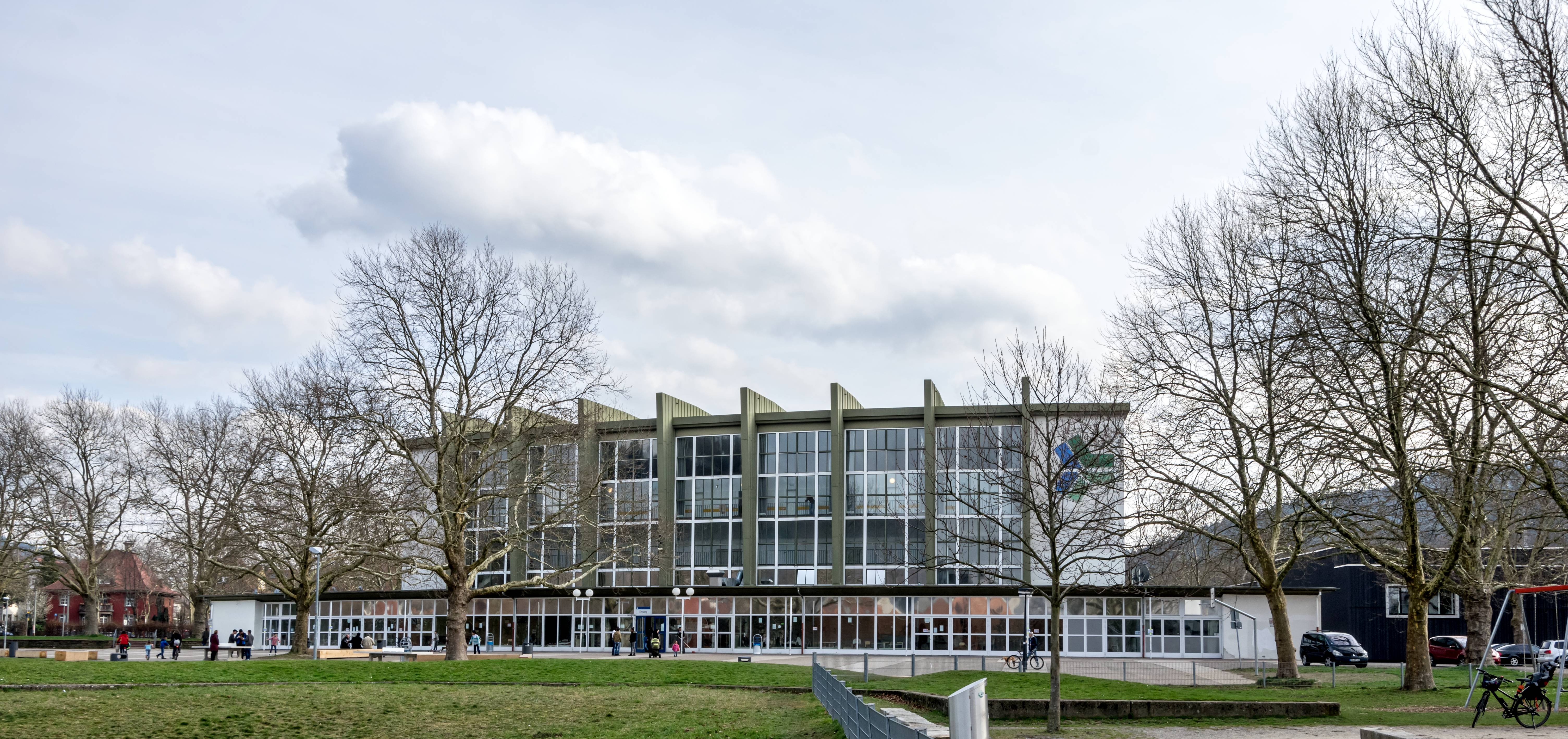 Bilder aus Freiburg